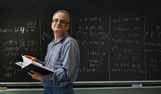 פרופסור למתמטיקה שהרן שלח